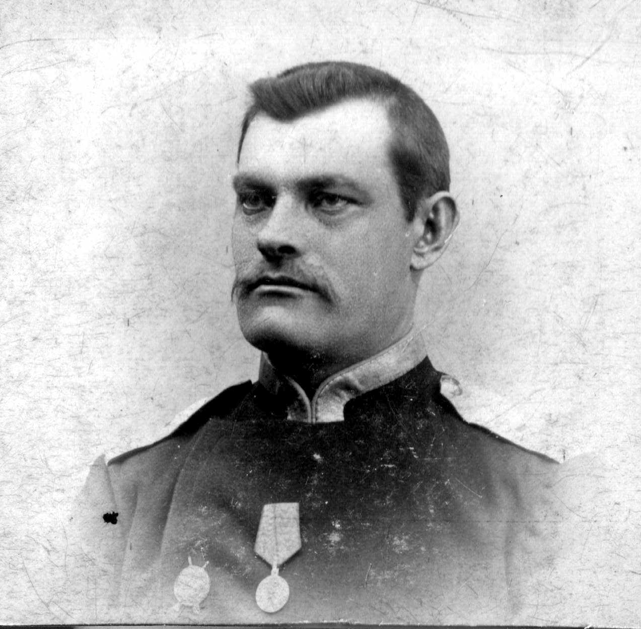 Ylikonstaapeli Juho Järvi